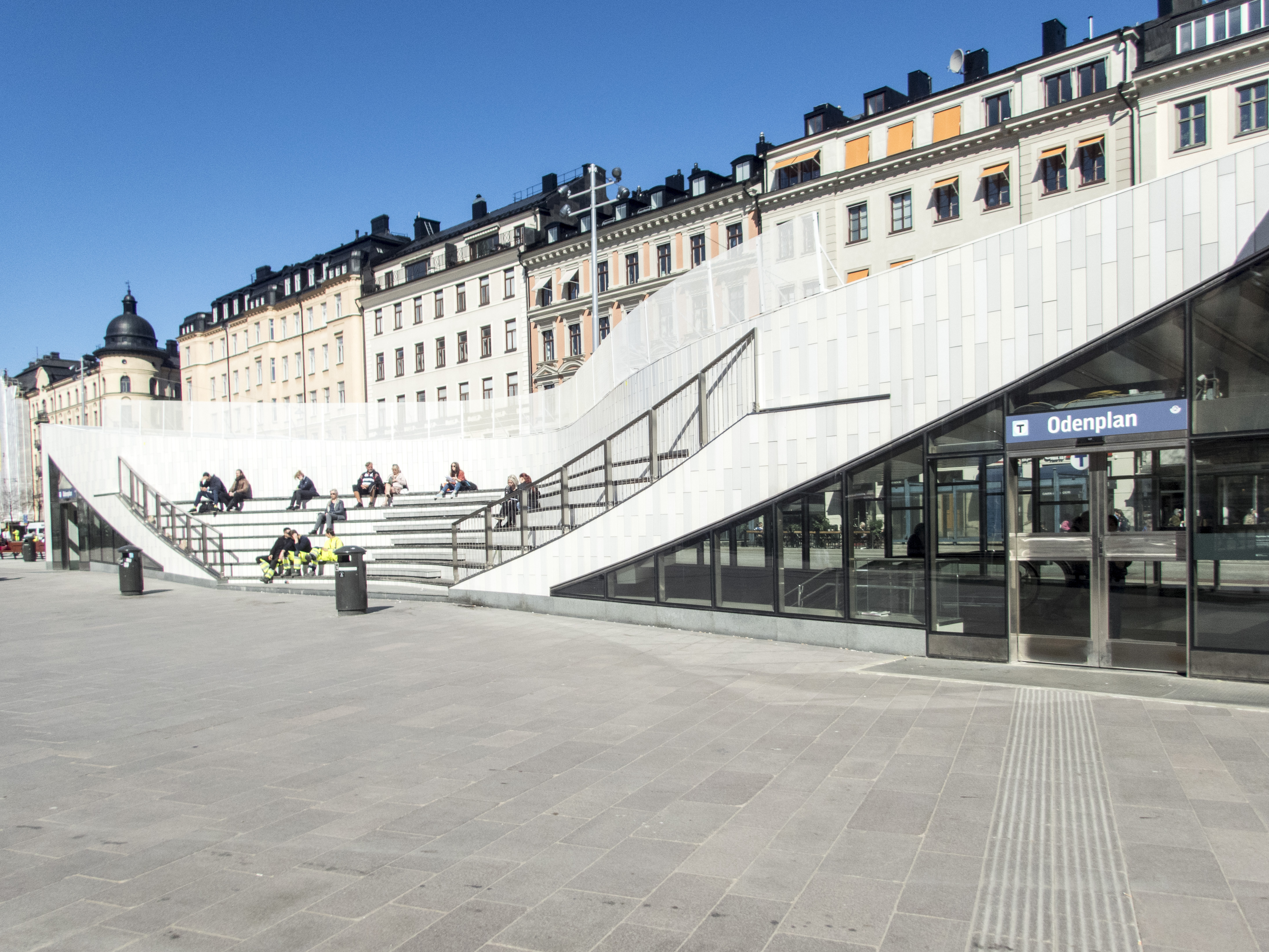 Odenplan 2017. Stationsnedgång ritad av 3XN arkitekter